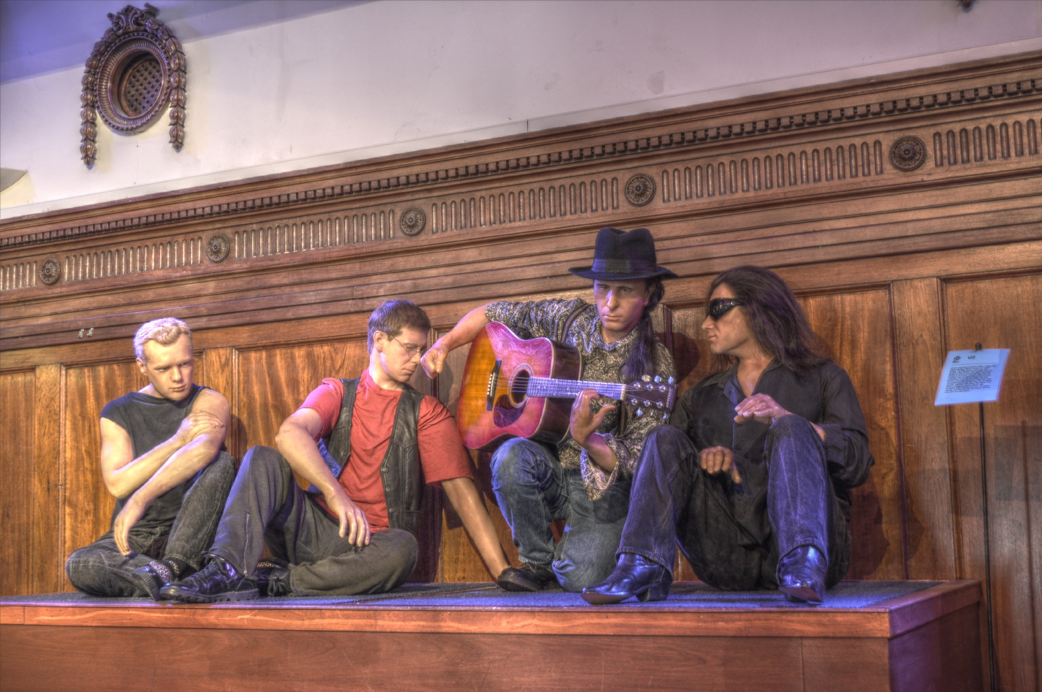 Camera: Nikon D5000 Luminance HDR, Mantiuk '06